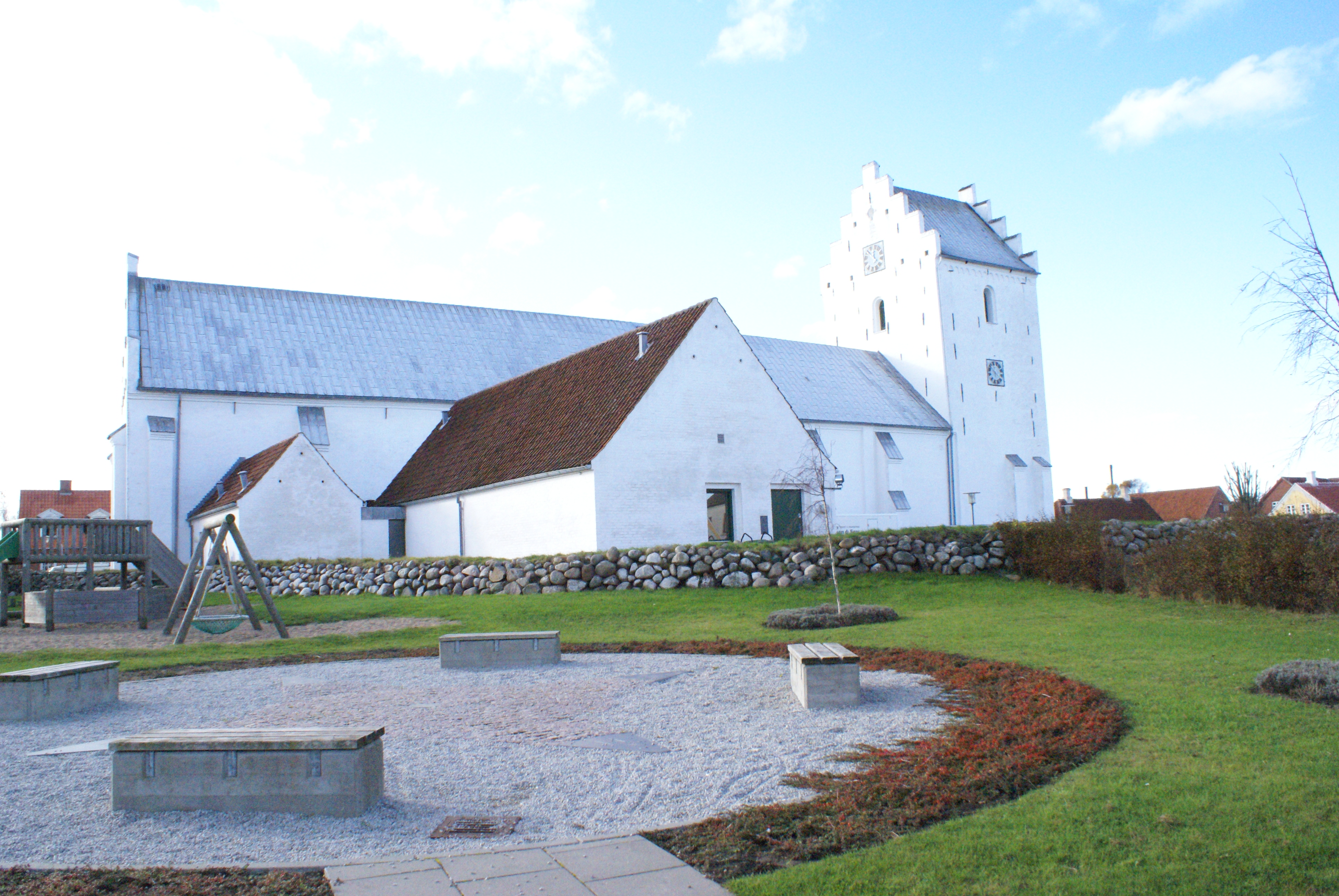 Sæby Kirke, Aalborg Stift